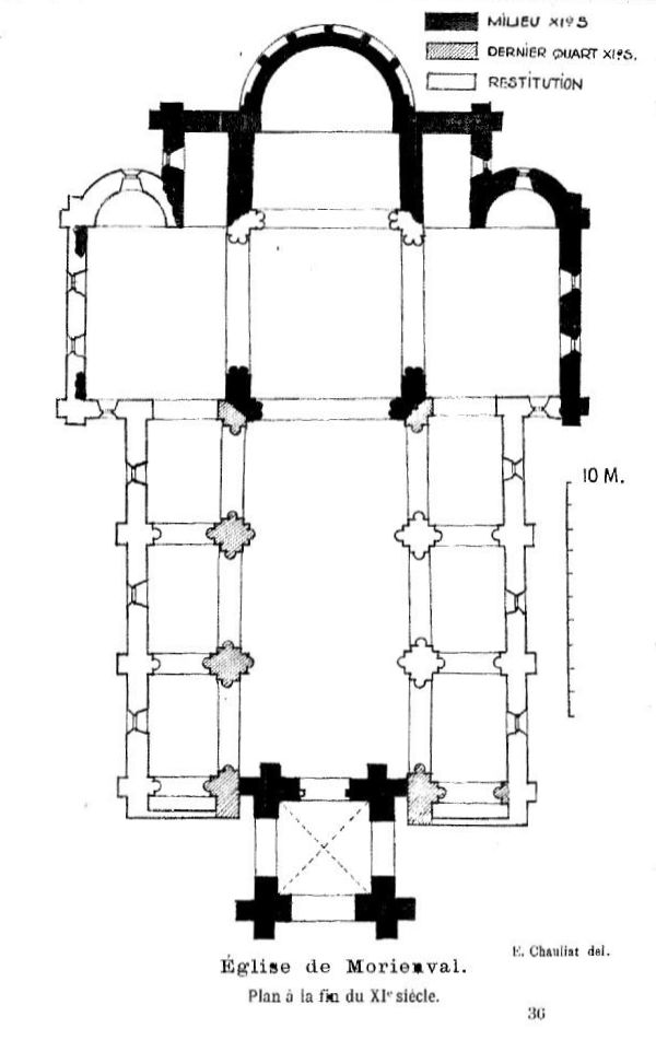 Plan à la fin du XIe siècle après la construction de la nef et des bas-côtés.